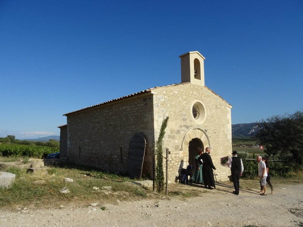 chapelle Saint peyre avec le curé de Robion